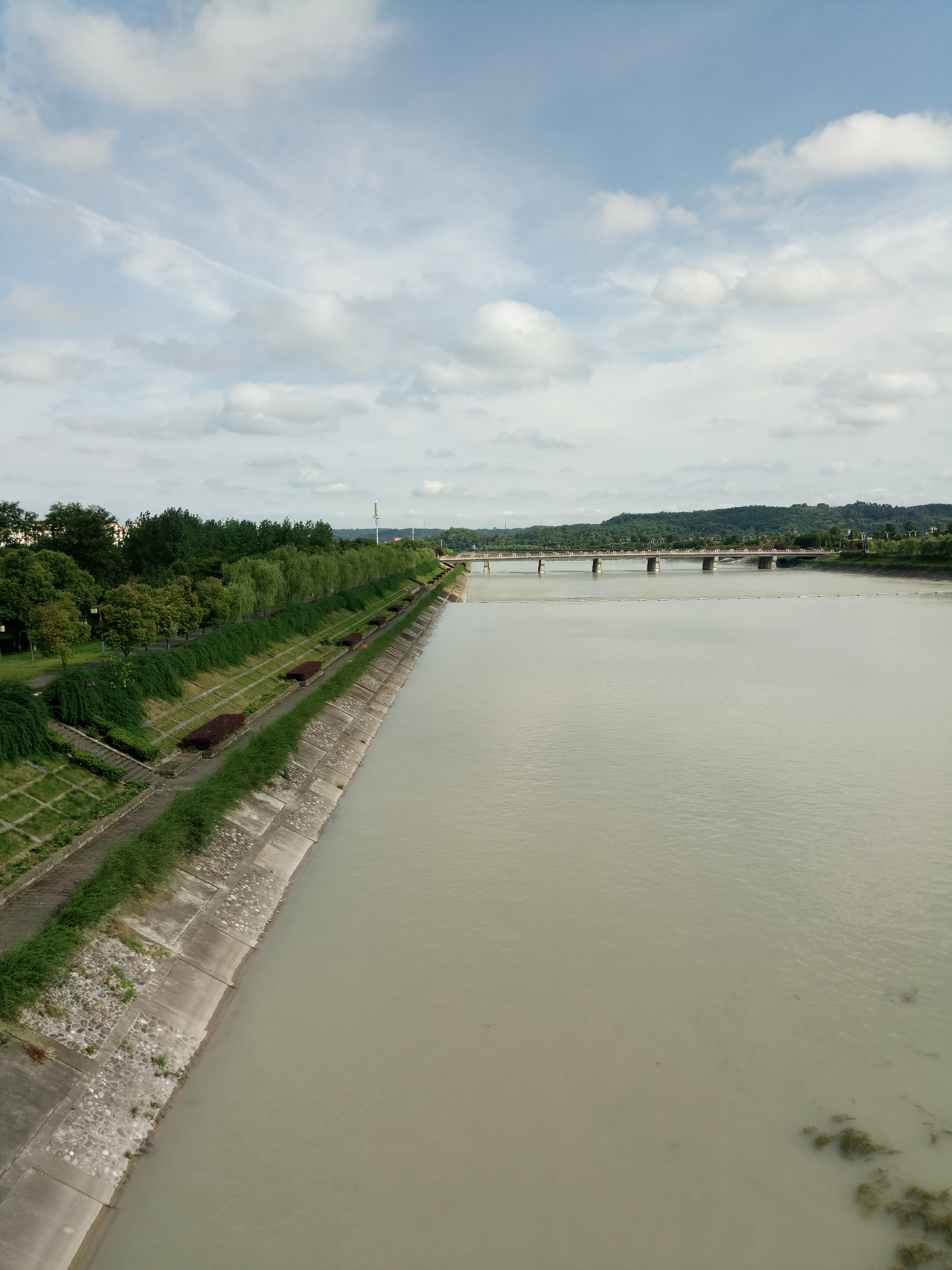 北川的河岸风光（从禹神桥上眺望）